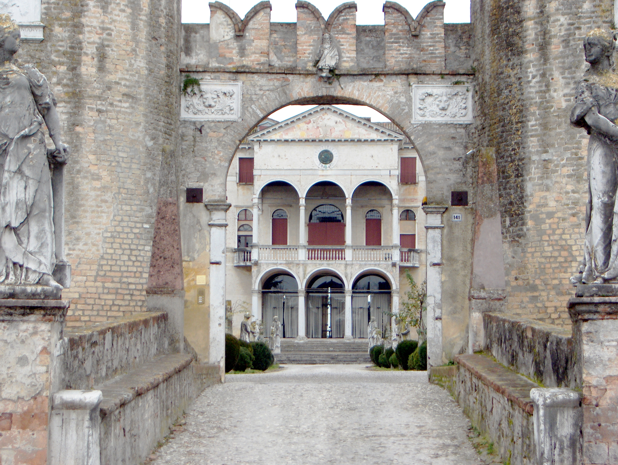 Cervellin, opera propria, Porta Villa Giustiniani, Roncade Treviso Italy